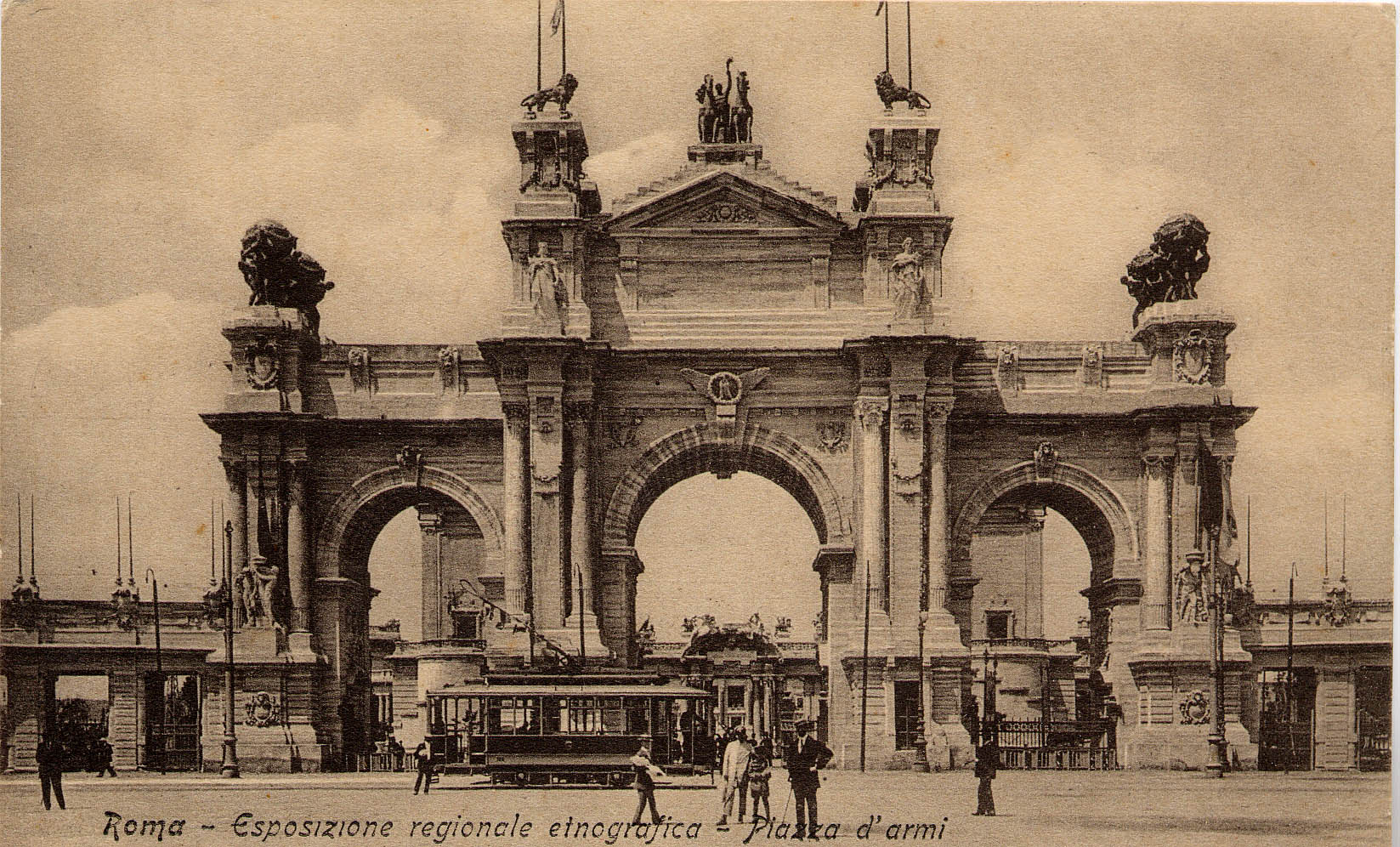 Roma esposizione 1911